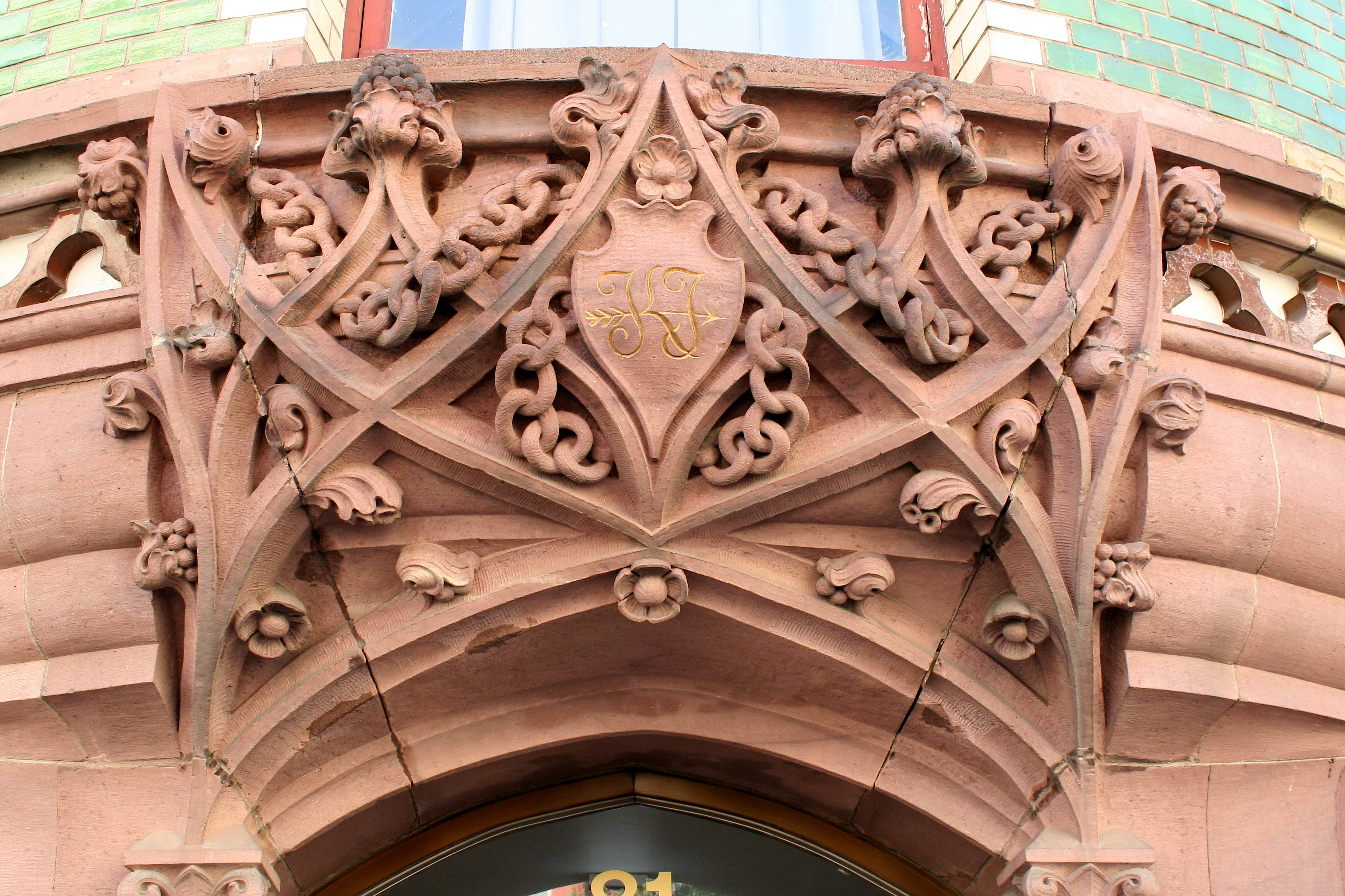 Pforzheim